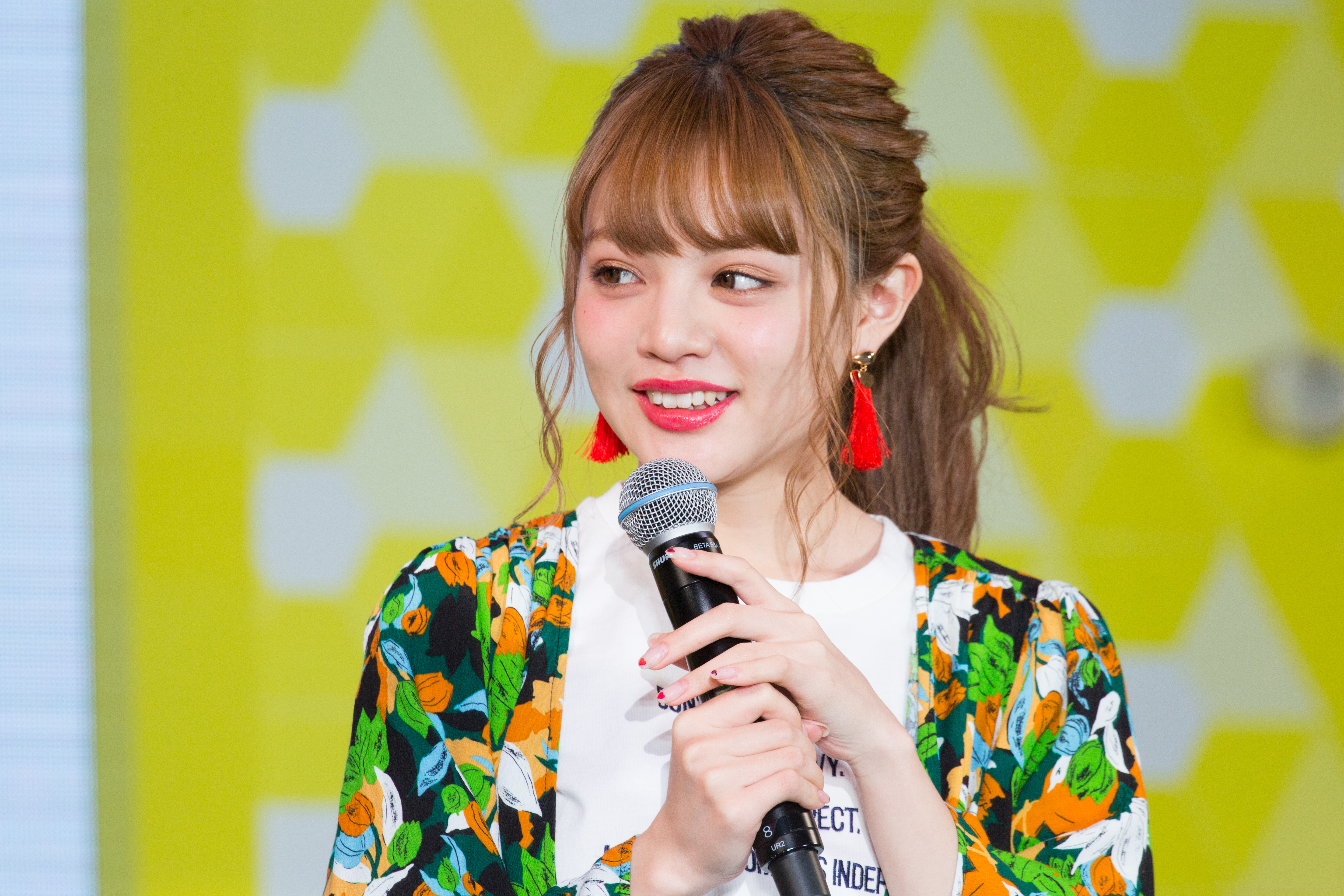 Super! C CHANNEL 2017 吉木千沙都